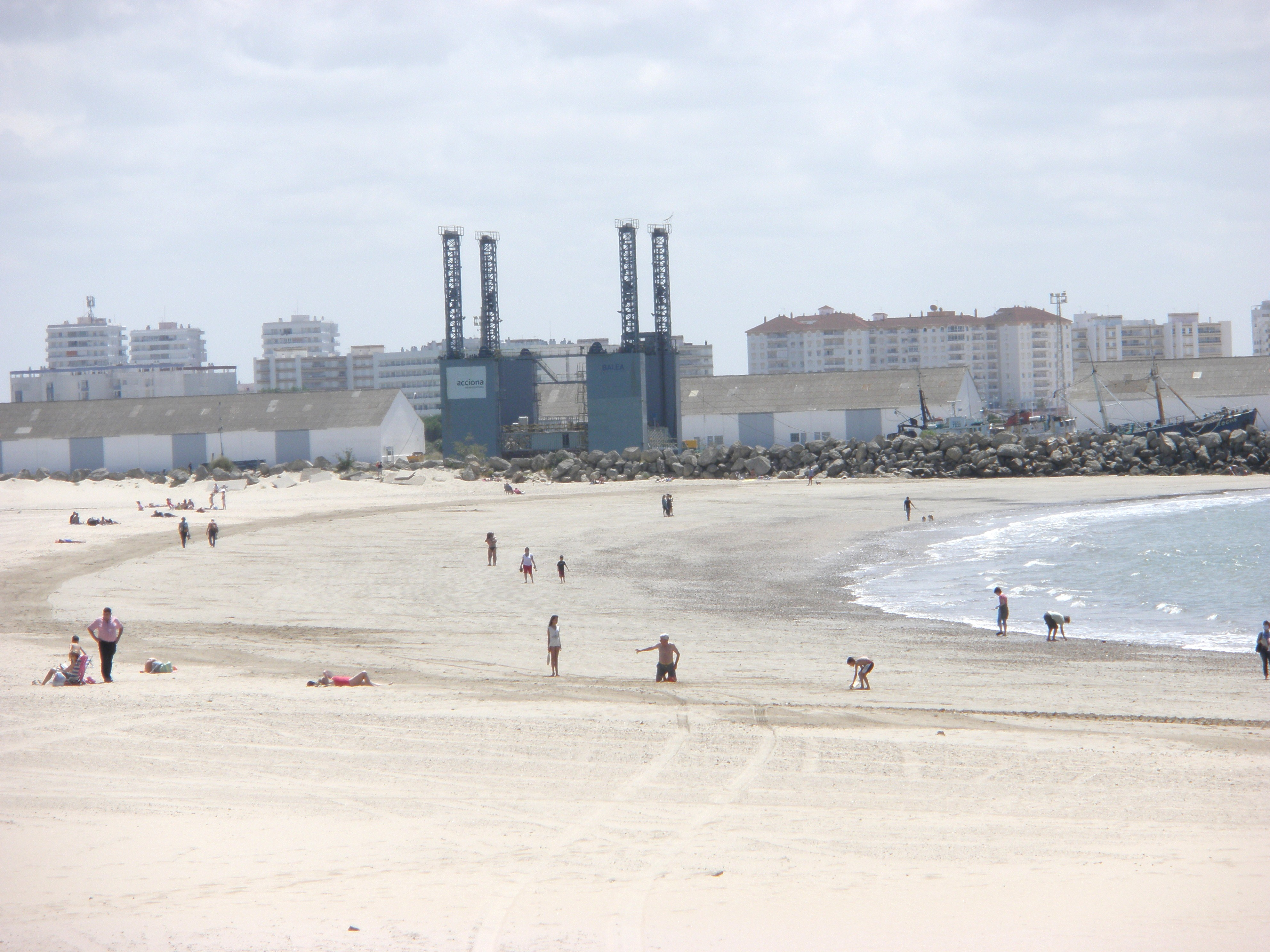 Playa de La Puntilla, El Puerto de Santa María